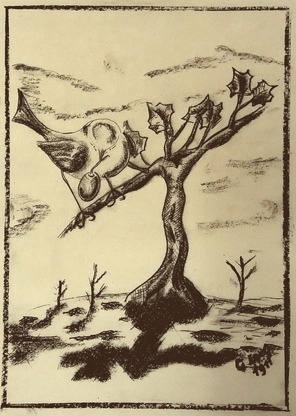 Zeichnung des Speyerer Dichters und Zeichners Georg Lang (1884-1944) Vermutlich angefertigt als Illustration zu einem Essay über die Speyerer Volkssage "Des Teufels Winzer",die vom Zusammentreffen des Speyerer Kaufmanns Ruland mit dem Gerlinger Winzer Weidle handelt. Die laut Signatur 1911 entstandene Zeichnung war bis in die 1990er Jahre im Gastraum einer Speyerer Weinstube zu sehen.